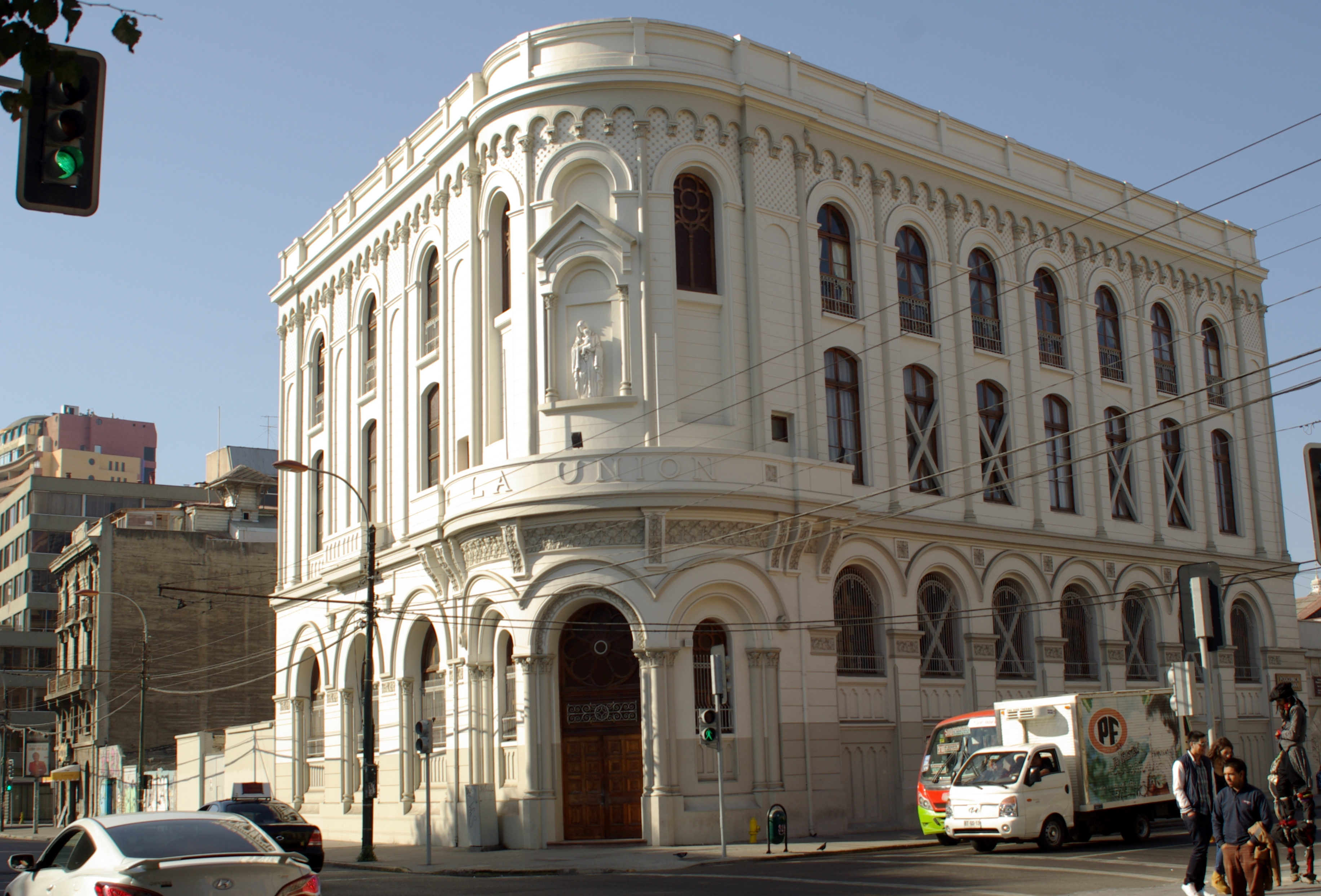 La sede histórica del desaparecido diario chileno La Unión, ubicada a un costado de la Plaza Victoria, en Chacabuco esquina Edwards, hoy perteneciente al obispado de Valparaíso